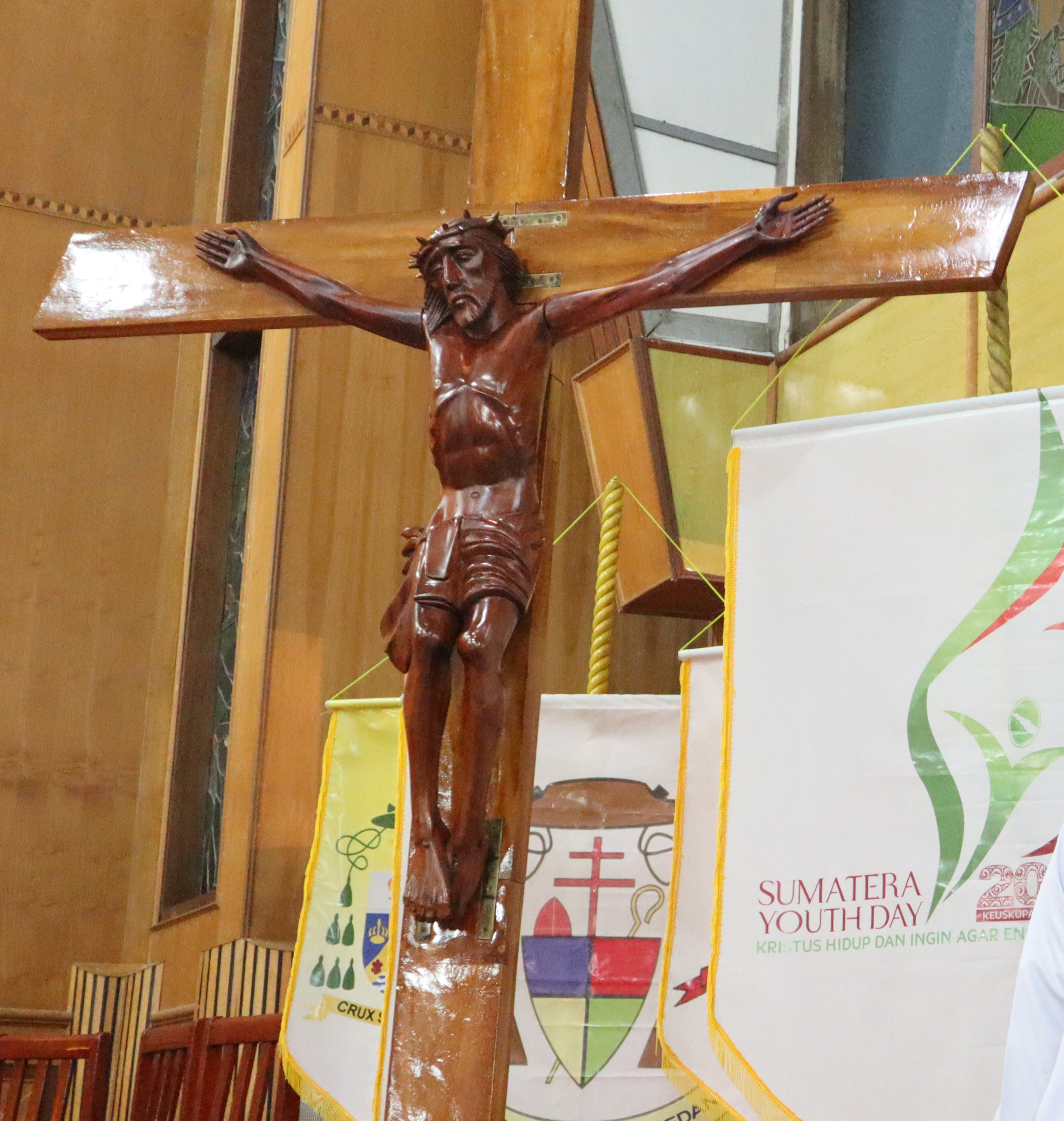 Foto salib SYD 2020 saat Misa Pemberkatan Salib di Keuskupan Agung Medan